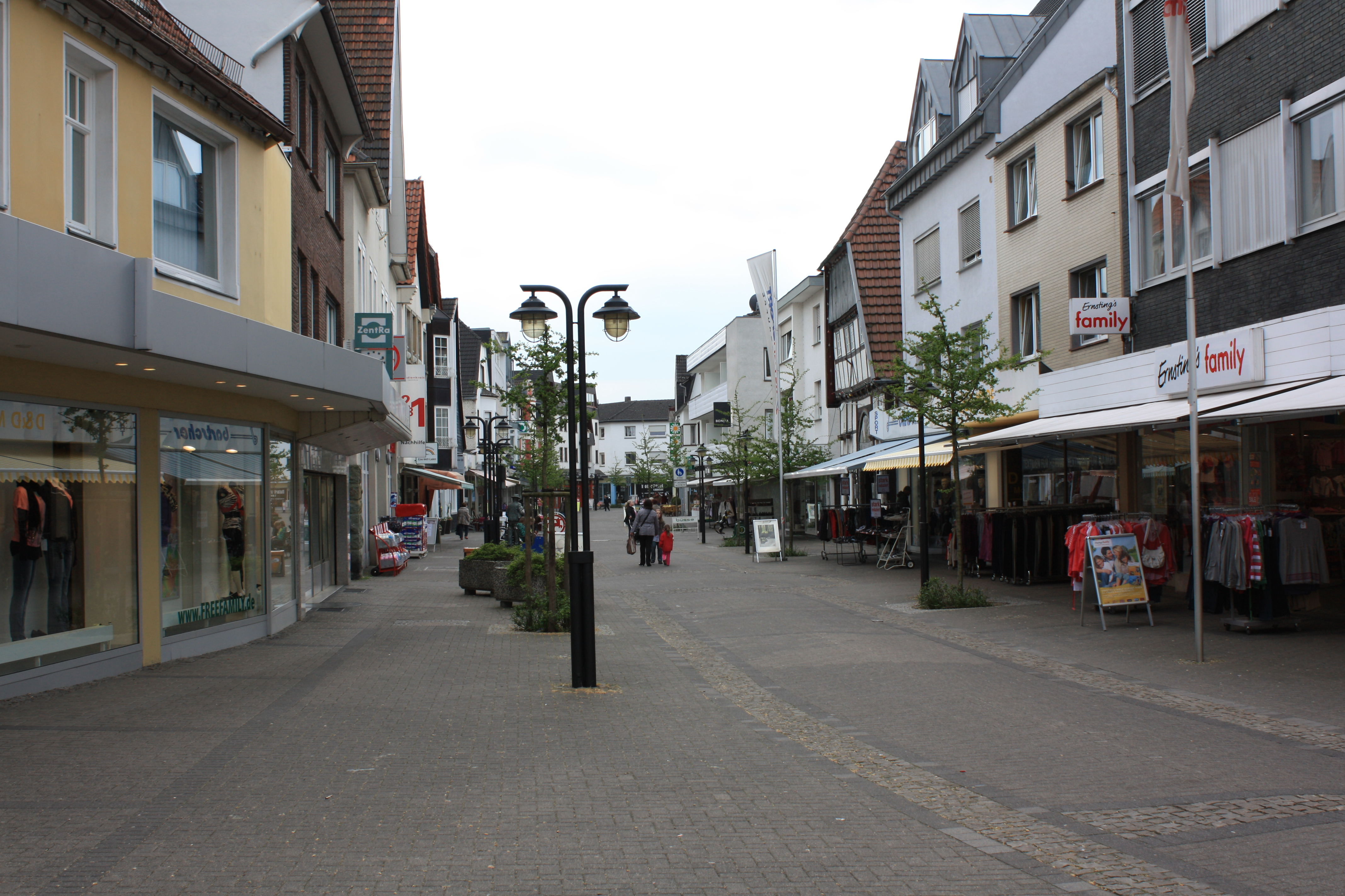 Fußgängerzone in Geseke